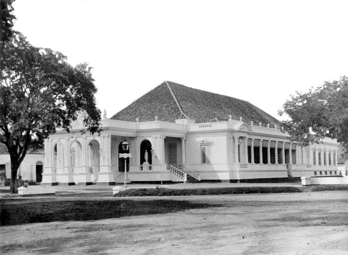 Negatief. De schouwburg aan de Komediebuurt in Weltevreden, Batavia